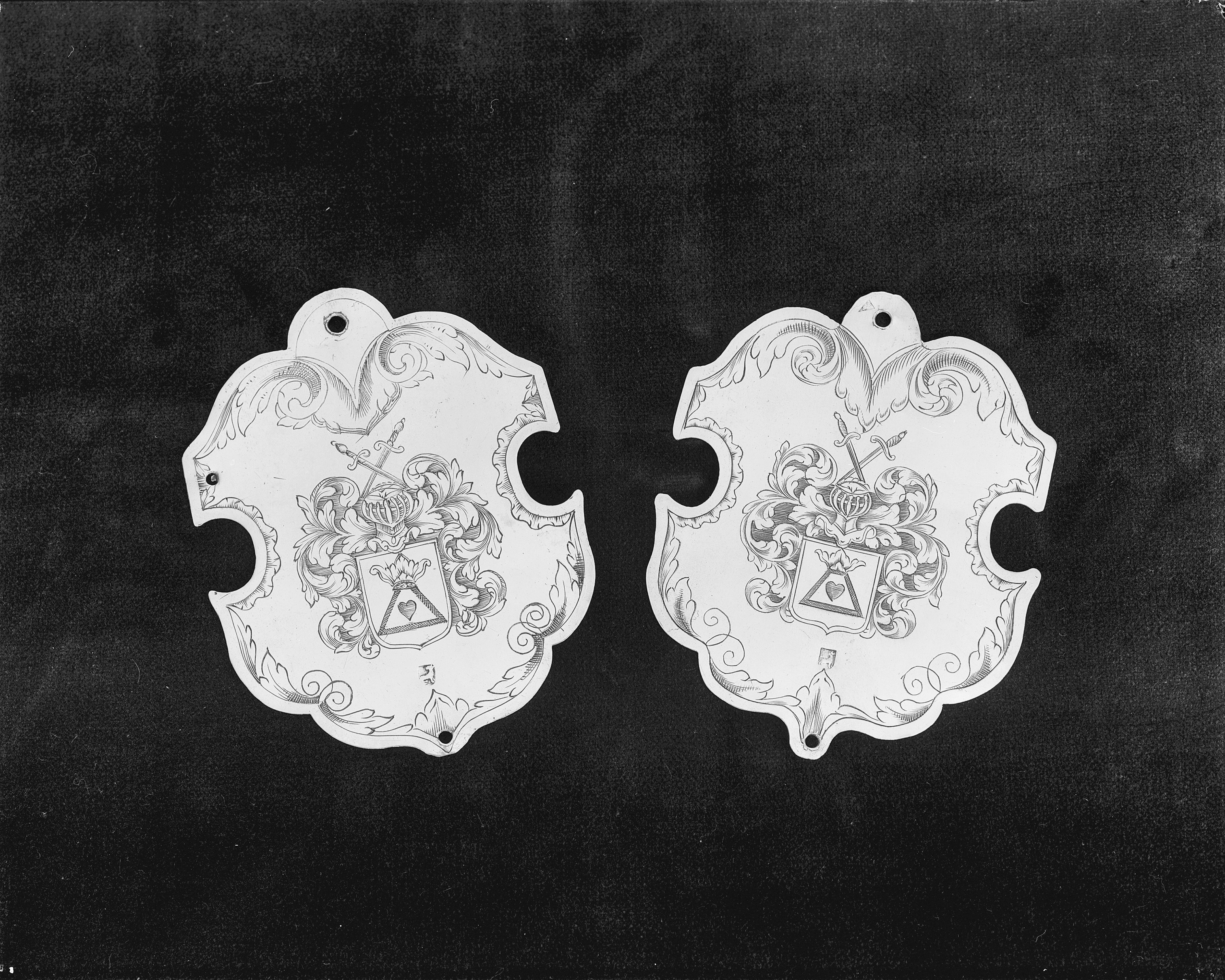 twee koningsplaten van het zilveren sieraad van het overasseltse schuttersgilde, N.M. Comm. 1966/24/25.